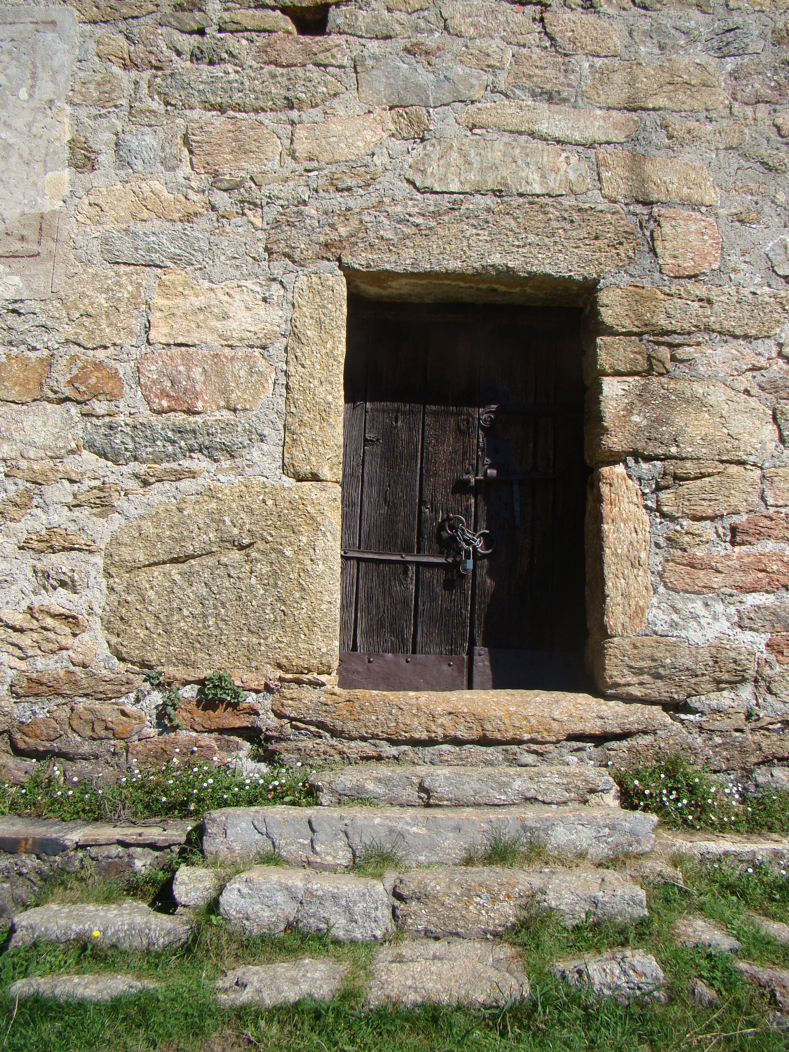 Ermitage Saint-Guilhem de Combret - porte